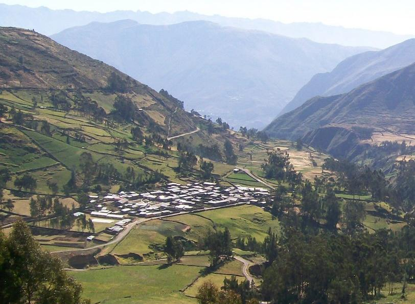 Astobamba - Cajatambo